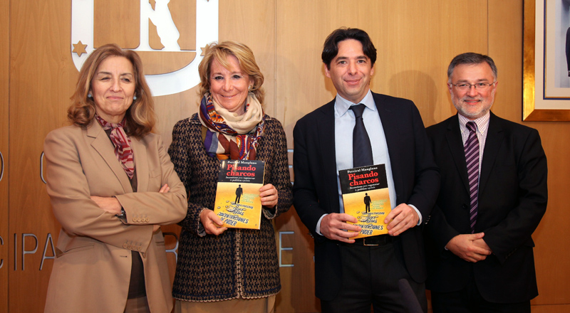 Esperanza Aguirre en la presentación de un libro de Percival Manglano